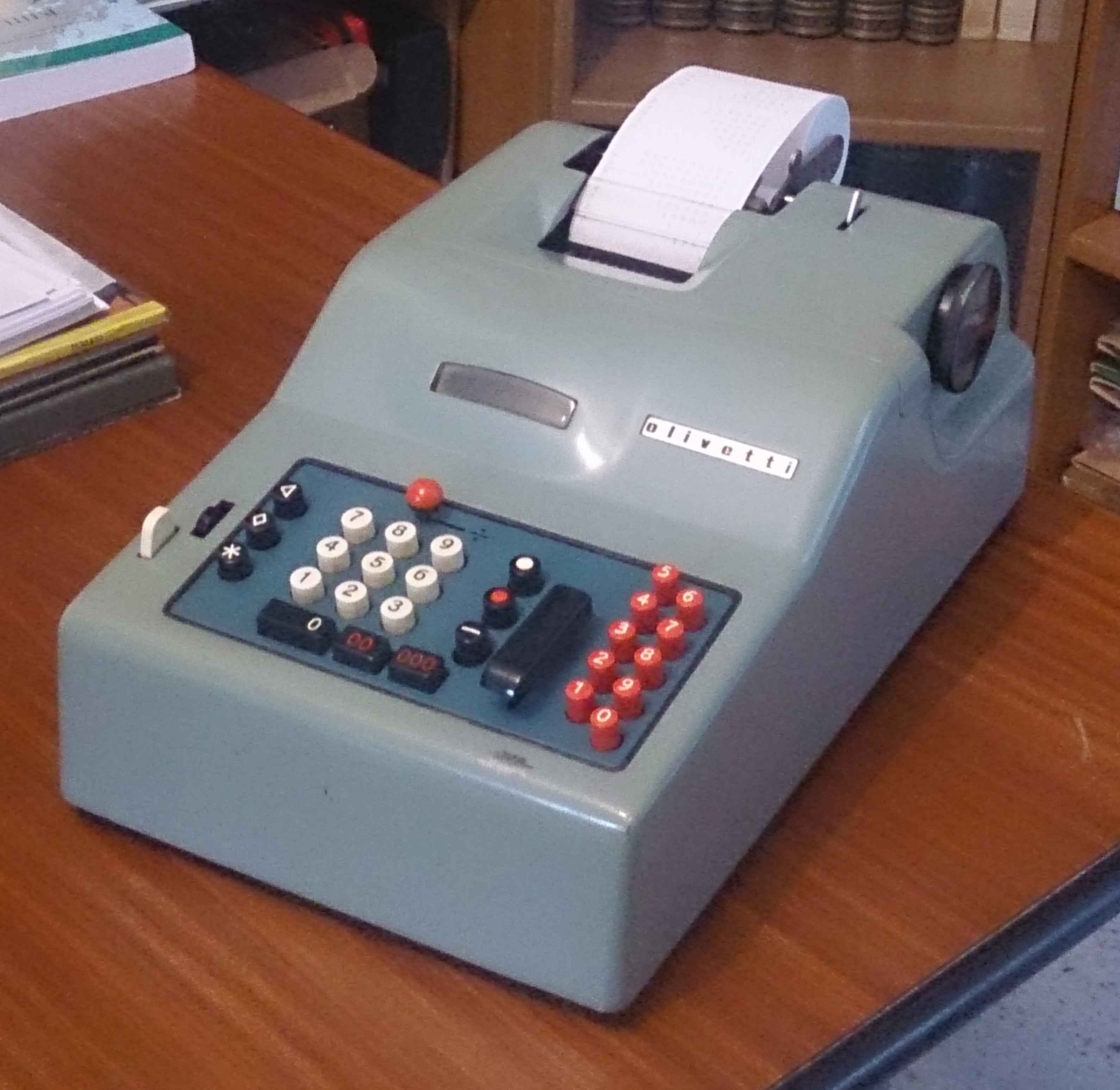 mia foto della divisumma 14 di mia proprietà